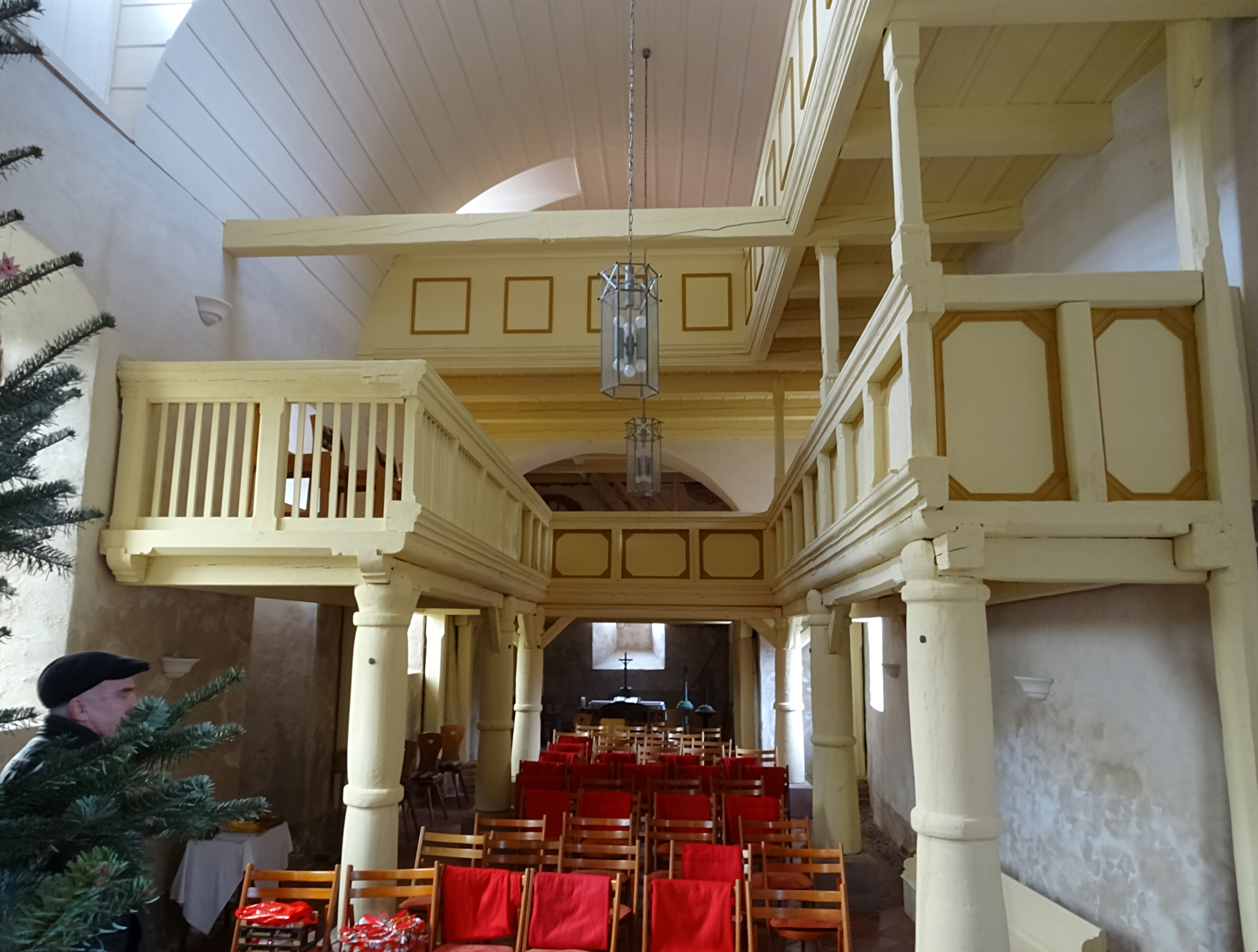 Innenraum St. Annen und Marien in Dittichenrode